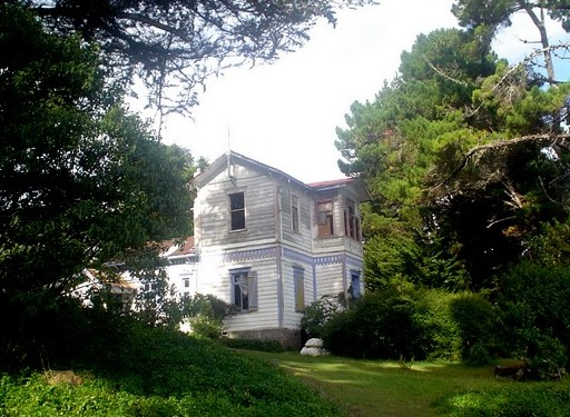 Isla Helvecia o Chaullin ubicada frente a la Isla de Calbuco, Decima Región, Chile. Aquí se encuentra uno de los tres parques de arrayanes mas grandes del mundo.